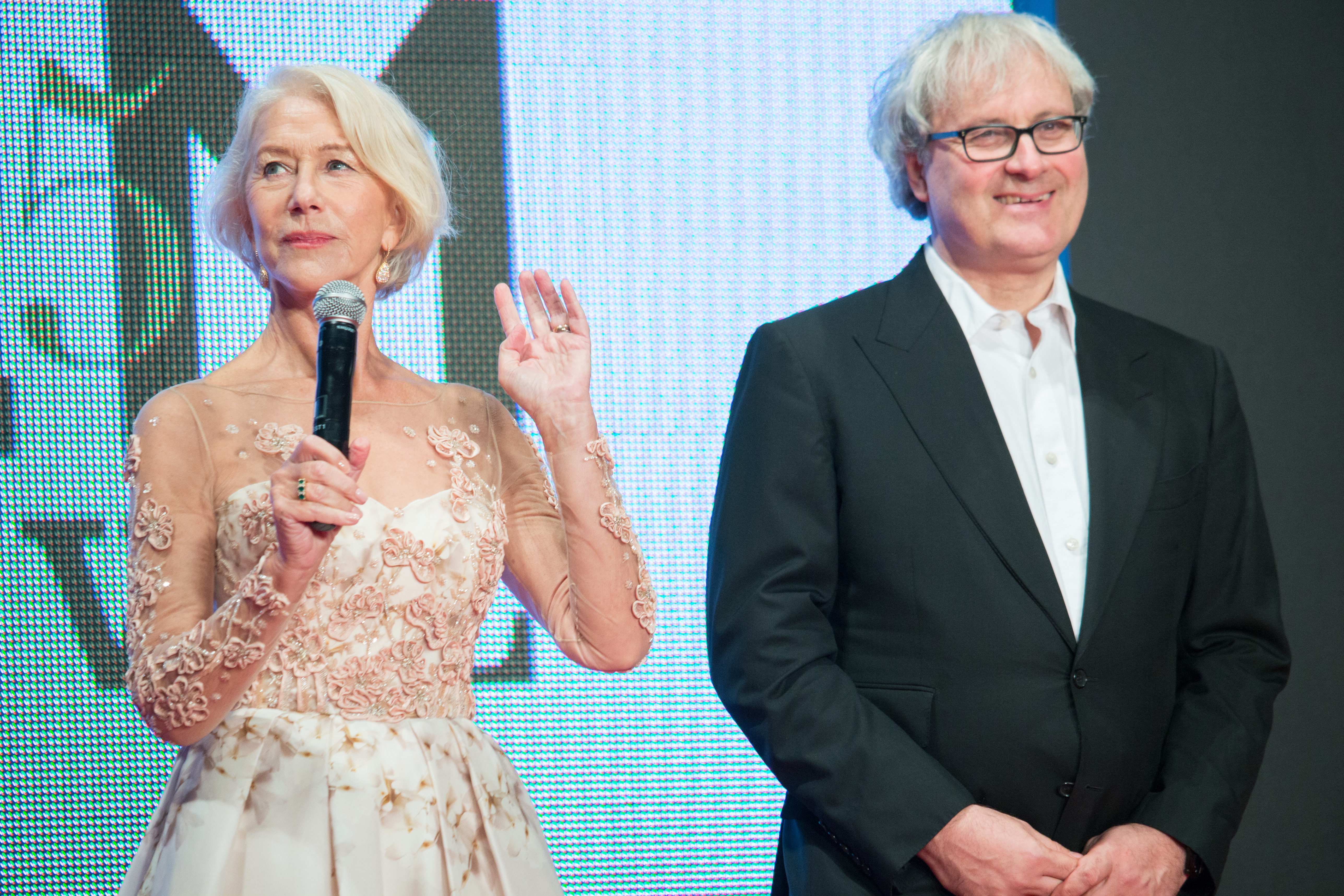 第28回 東京国際映画祭 オープニングセレモニー ヘレン・ミレン サイモン・カーティス (黄金のアデーレ 名画の帰還)